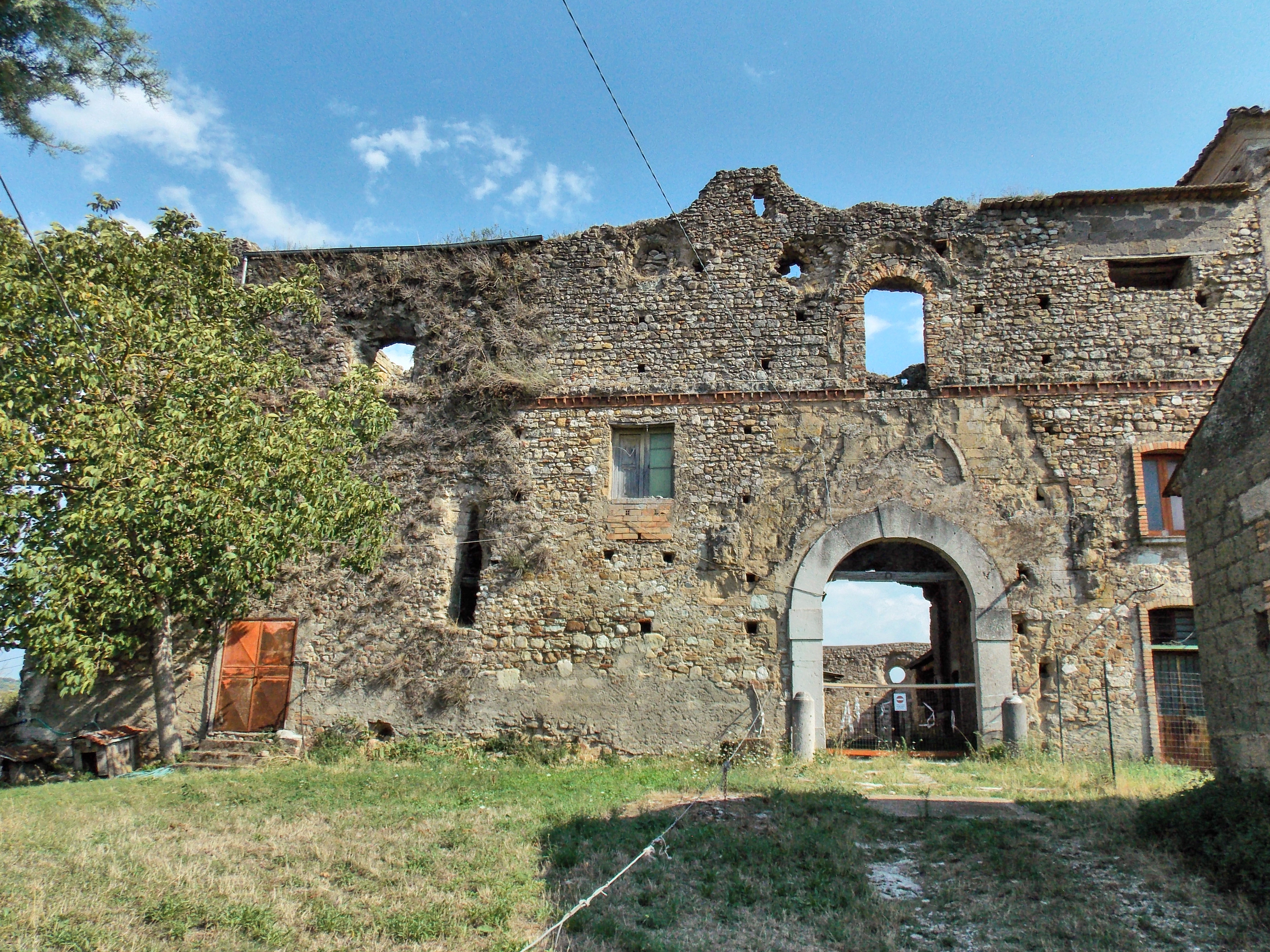 Il Casino del Principe, costruzione voluta da Federico II al Cubante di Calvi (BN)